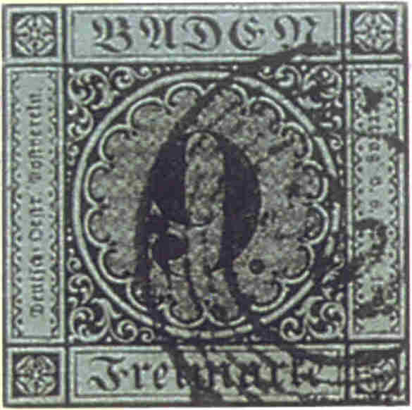 Baden Fehldruck, 9 Kreuzer